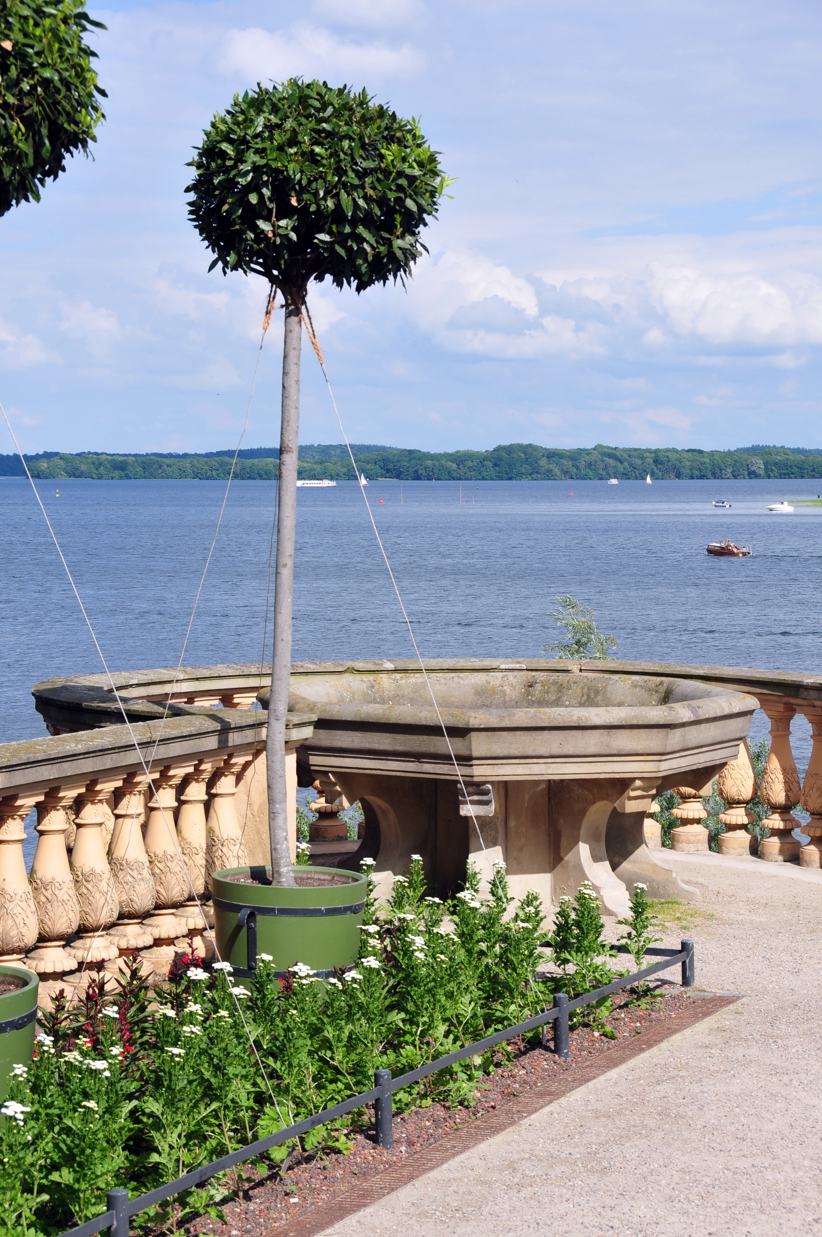 Schwerin; mit 50mm Brennweite von der Orangerie zum Bahnhof von der Terrasse aus denkt man, am Meer zu sein